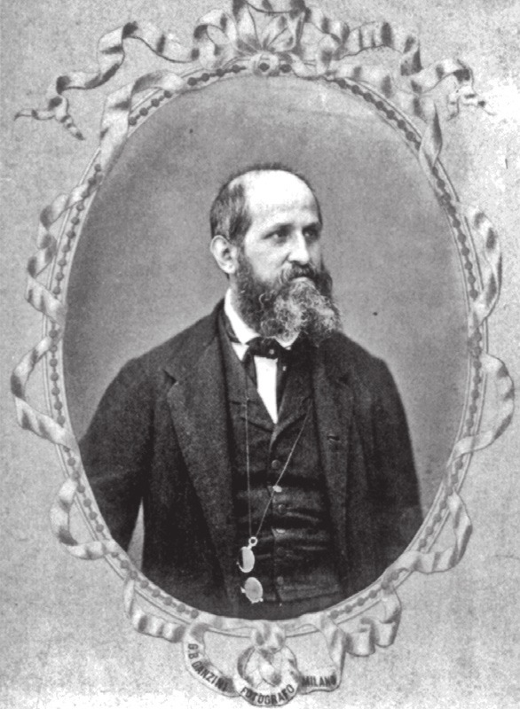 Pacifico Valussi ritratto da Giovan Battista Ganzini (collezione privata).